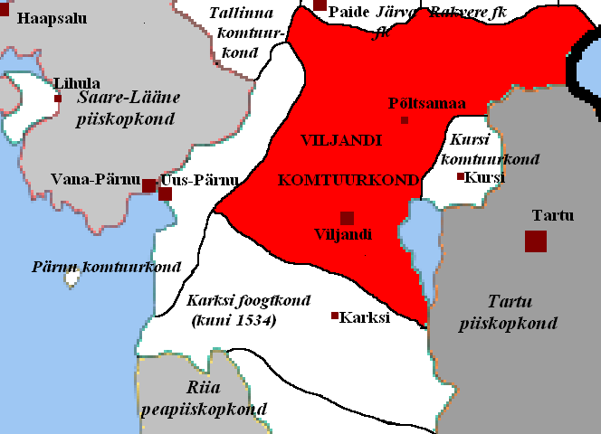 Viljandi komtuurkond 15. sajandi lõpust 1558. aastani